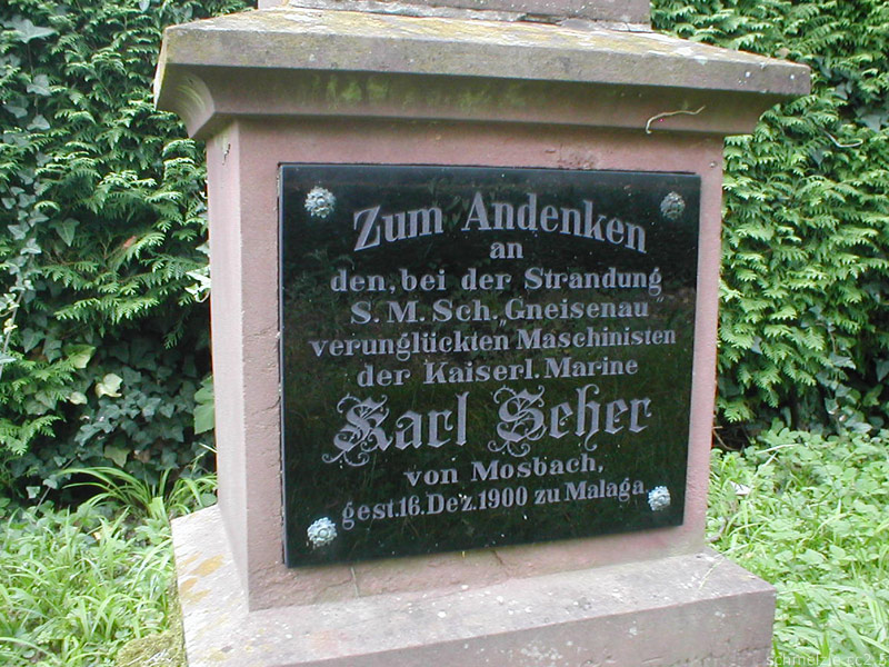 Gedenktafel für einen bei der Strandung der SMS Gneisenau vor Malaga im Jahr 1900 verstorbenen Maschinisten in Mosbach